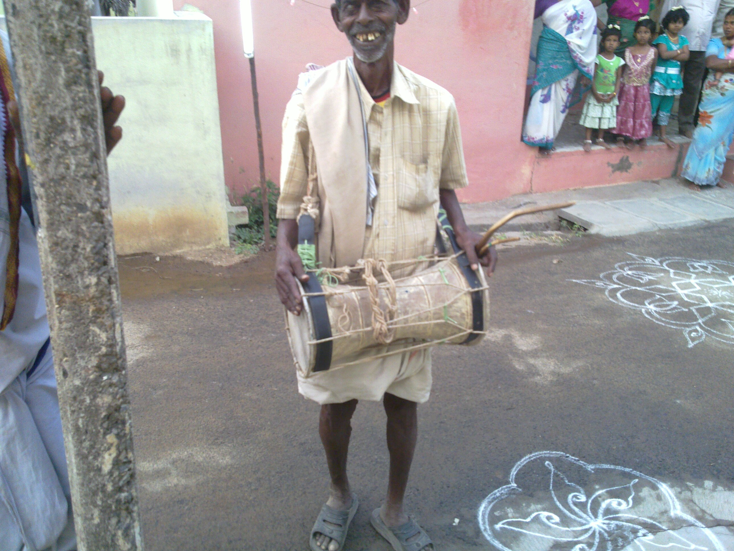 கிராமத்திருவிழாக்களில் - உருமி மேளம்